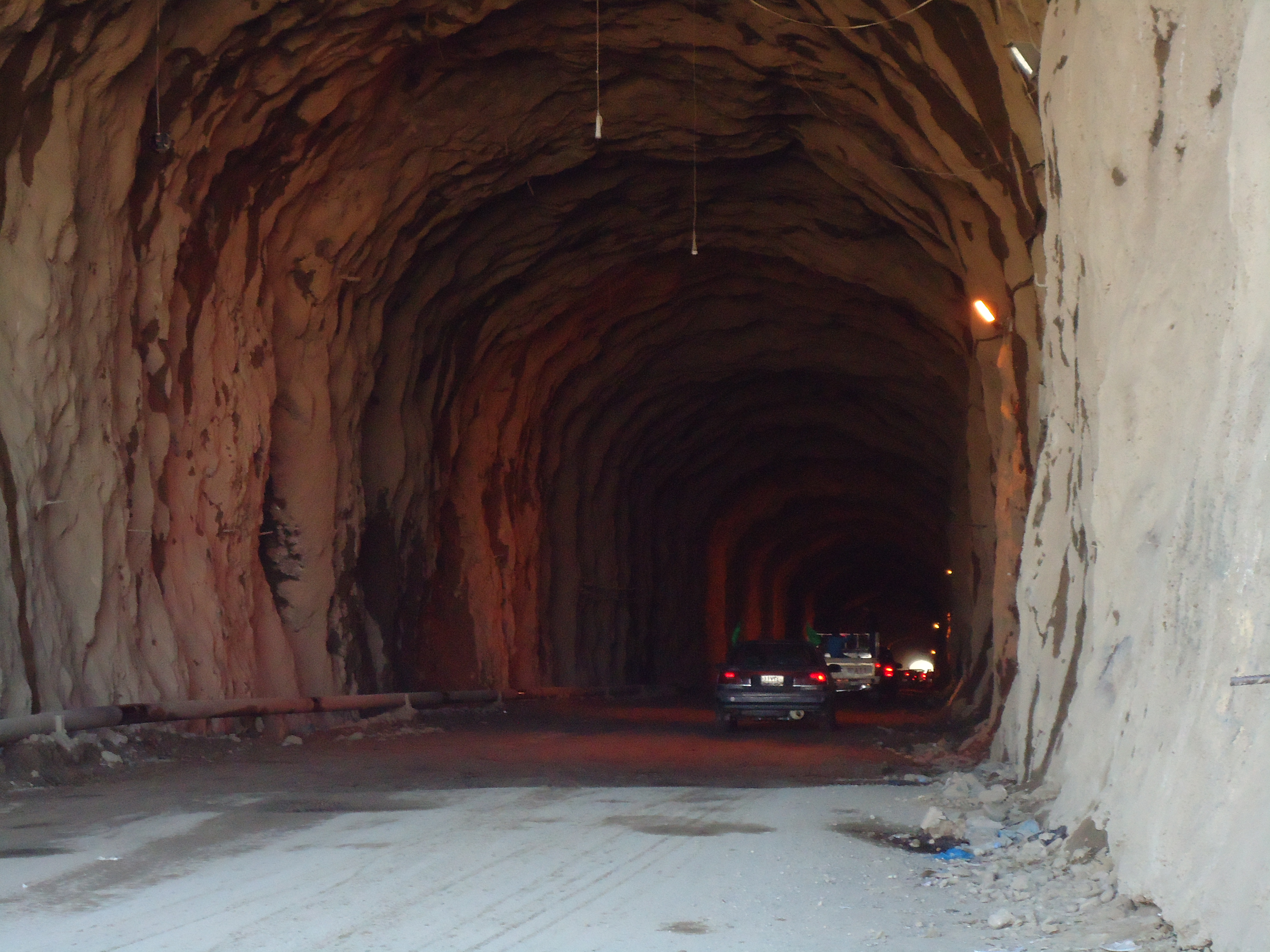 کوردی: تونێلی بێخمە